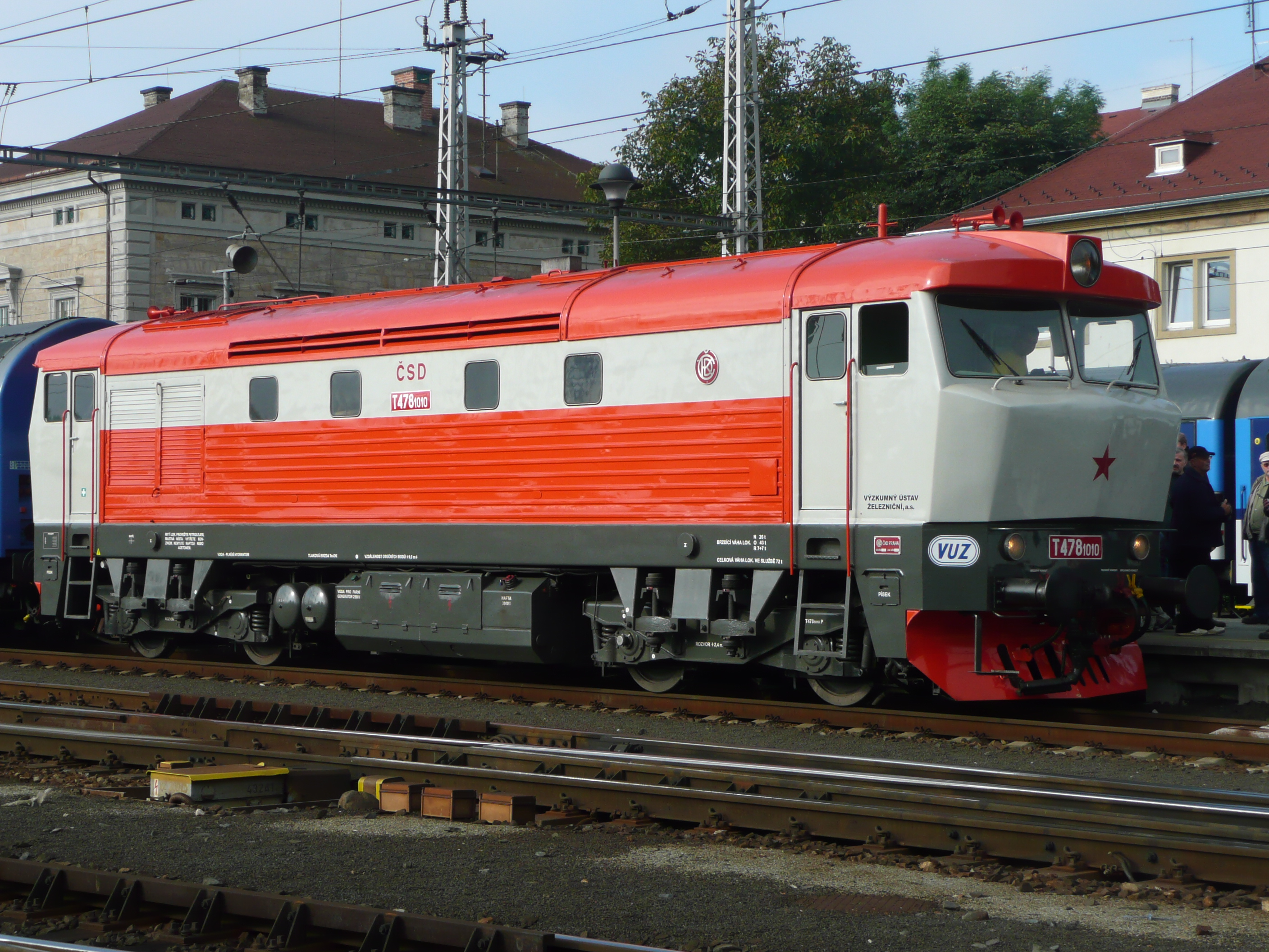 T 478.1010 auf einer Fahrzeugausstellung in Děčín